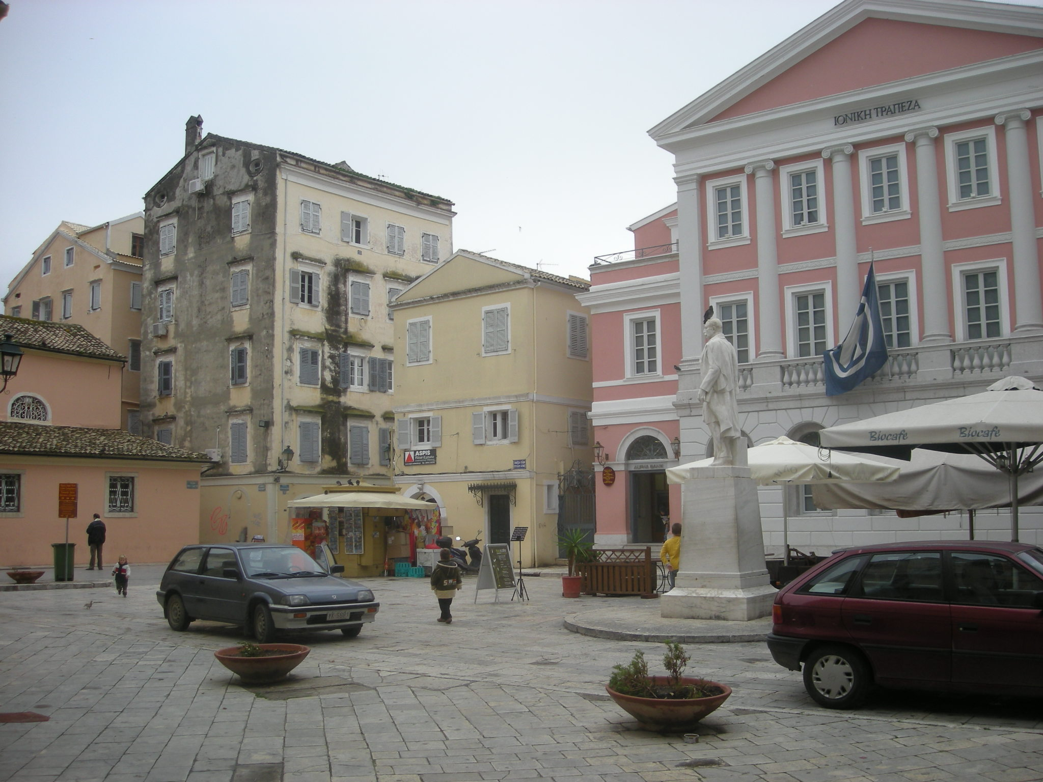 Πλατεία Ηρώων Κυπριακού Αγώνα (Ιονική Τραπέζα)